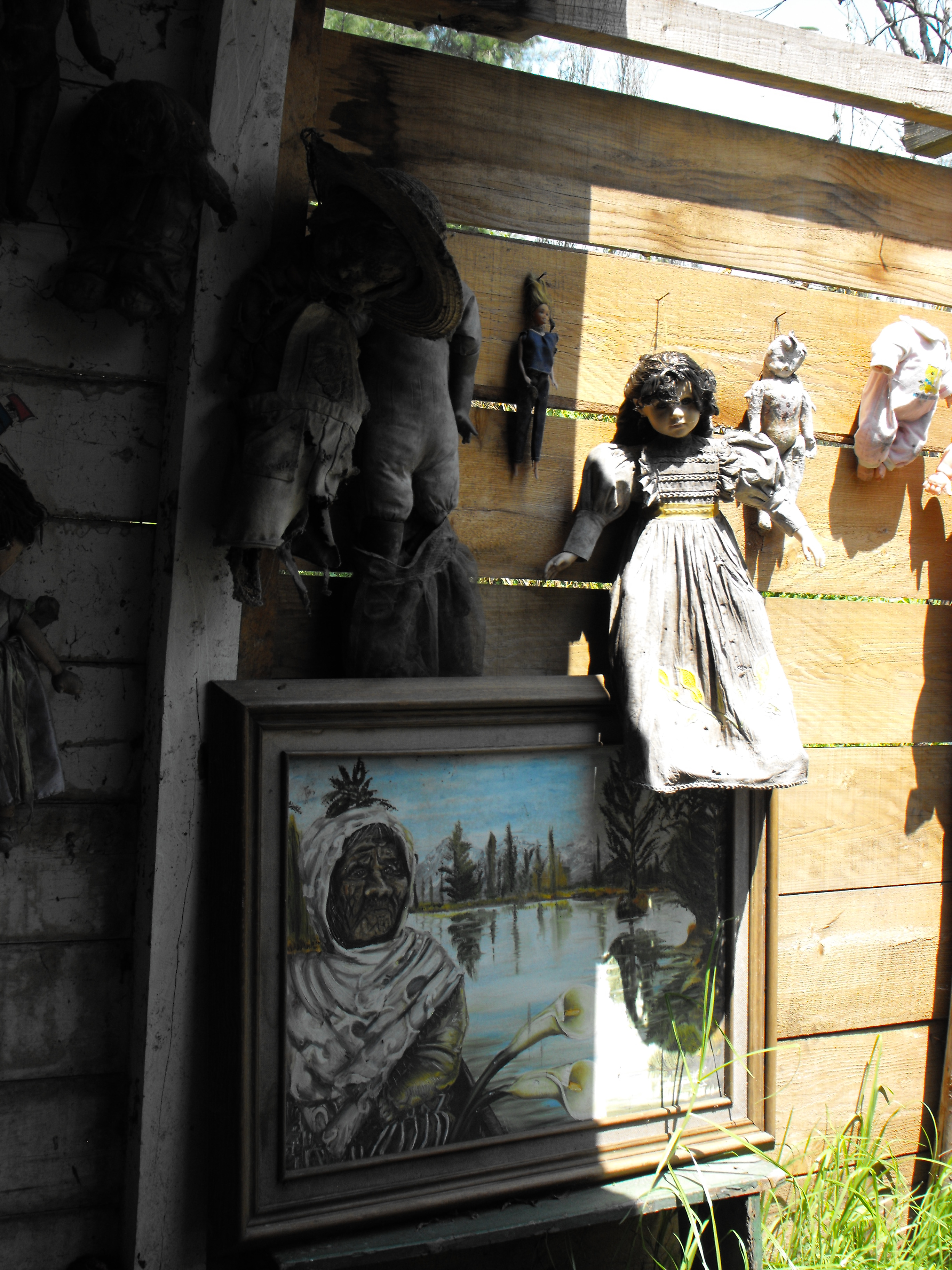 A la izquierda, la muñeca más antigua que forma parte de la colección de muñecas de la llamada "isla de las muñecas", en los canales de Xochimilco, ciudad de México.